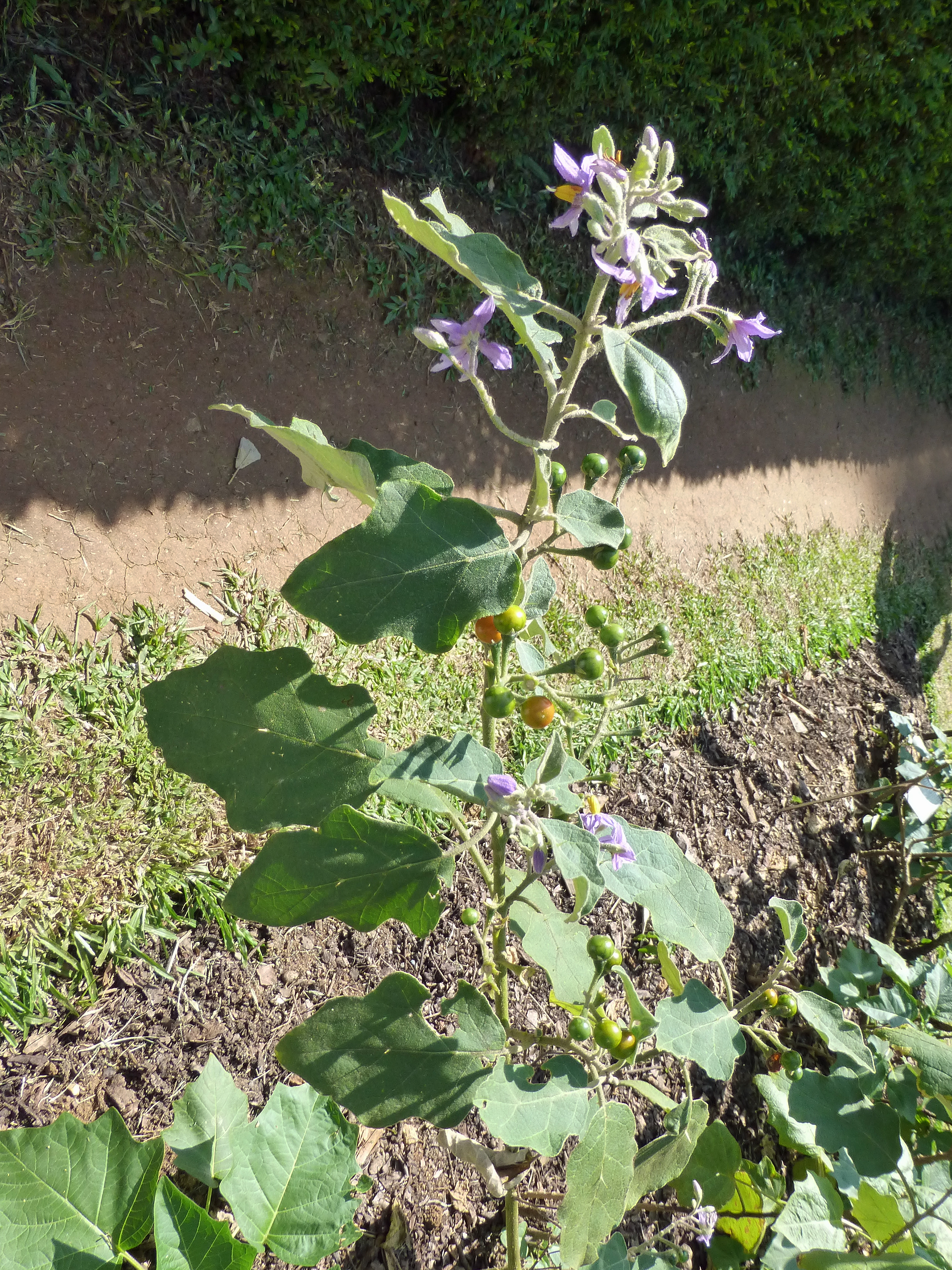 Solanum americanum au Jardin botanique de Kandy (Sri Lanka). origine : Amérique du Sud